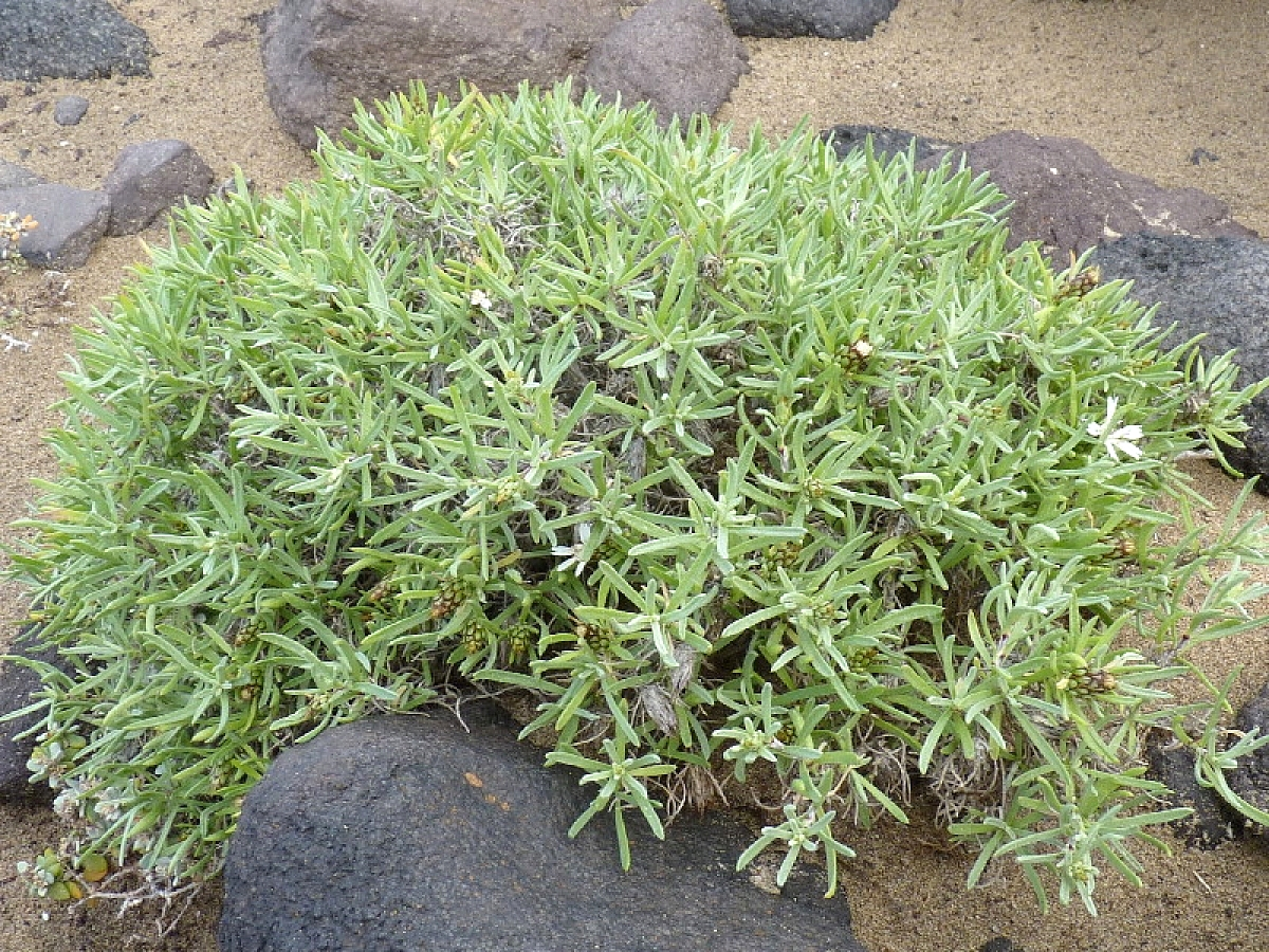 Atractylis arbuscula - Aspecto general - Lanzarote (Islas Canarias, España).